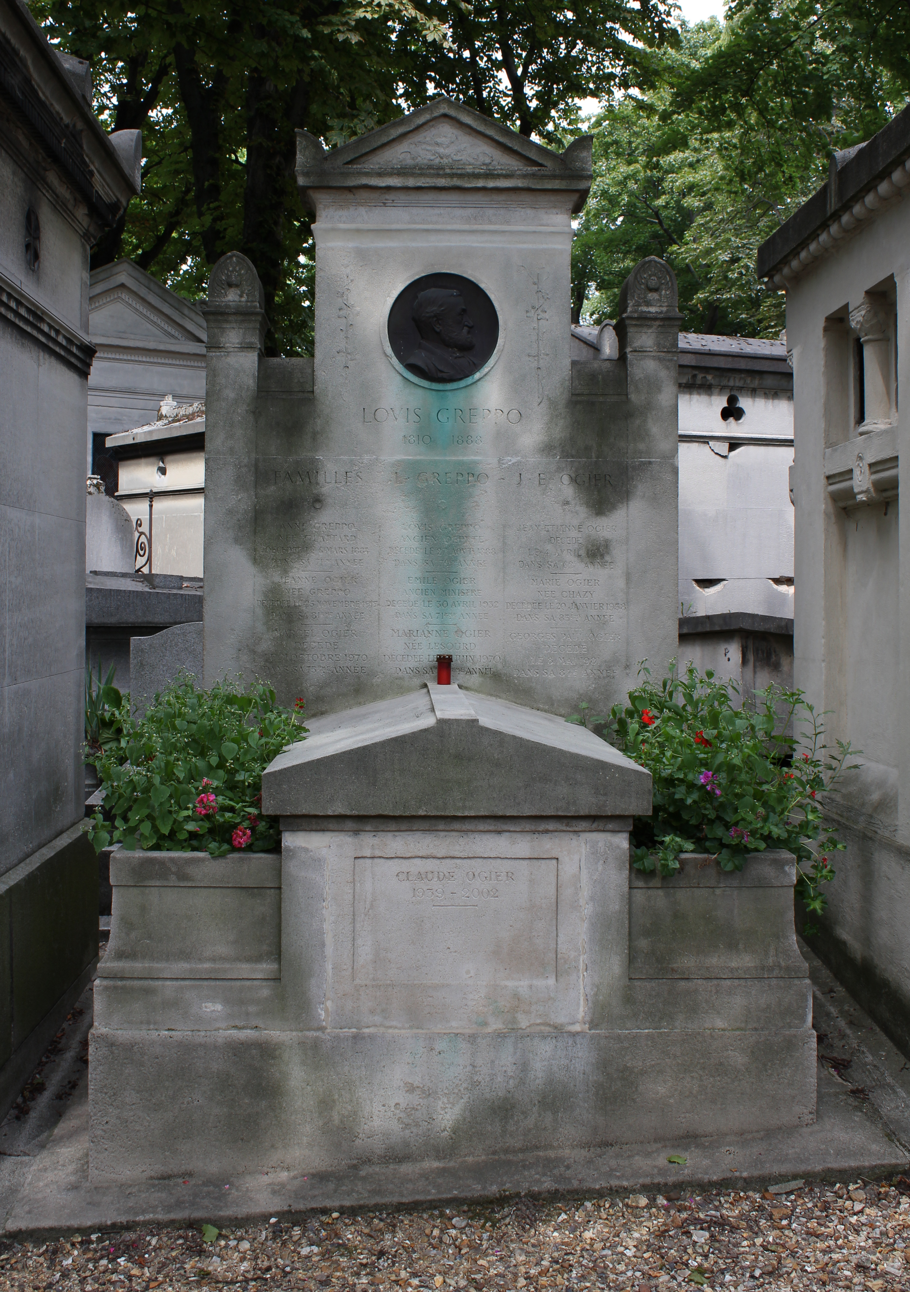 Vue d'ensemble